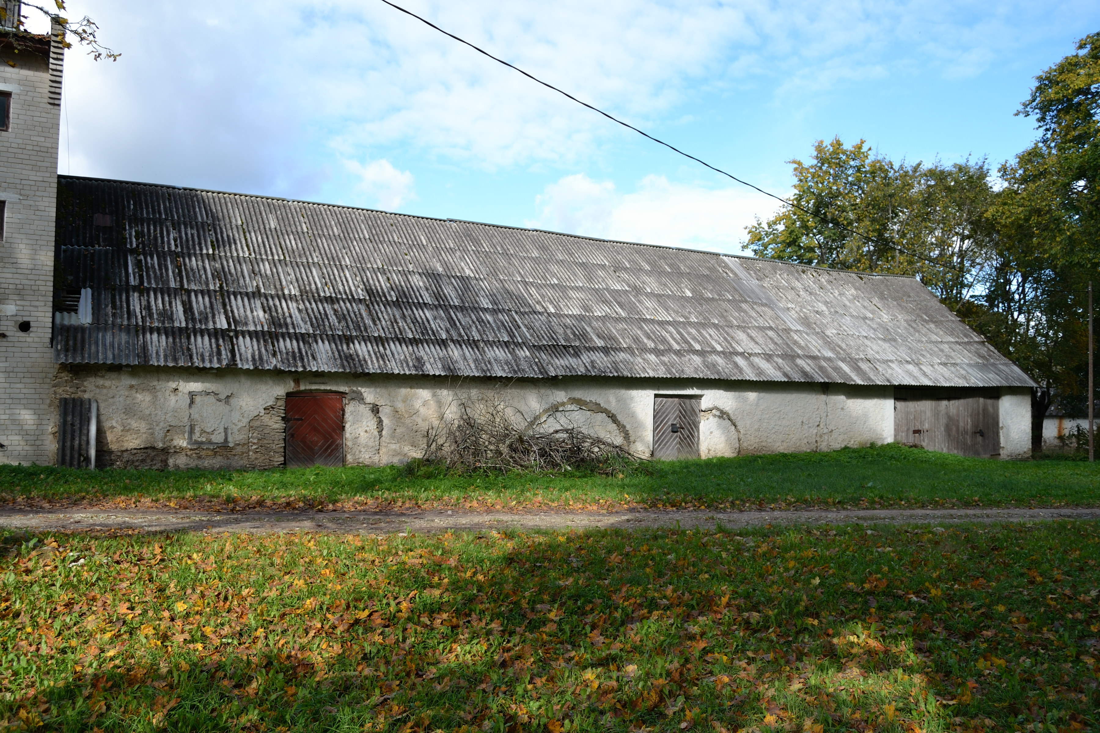 Härgla mõisa ait